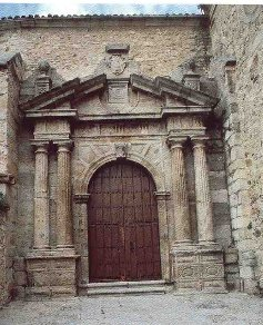 Iglesia de Santa Maria en Hervás, provincia de Cáceres